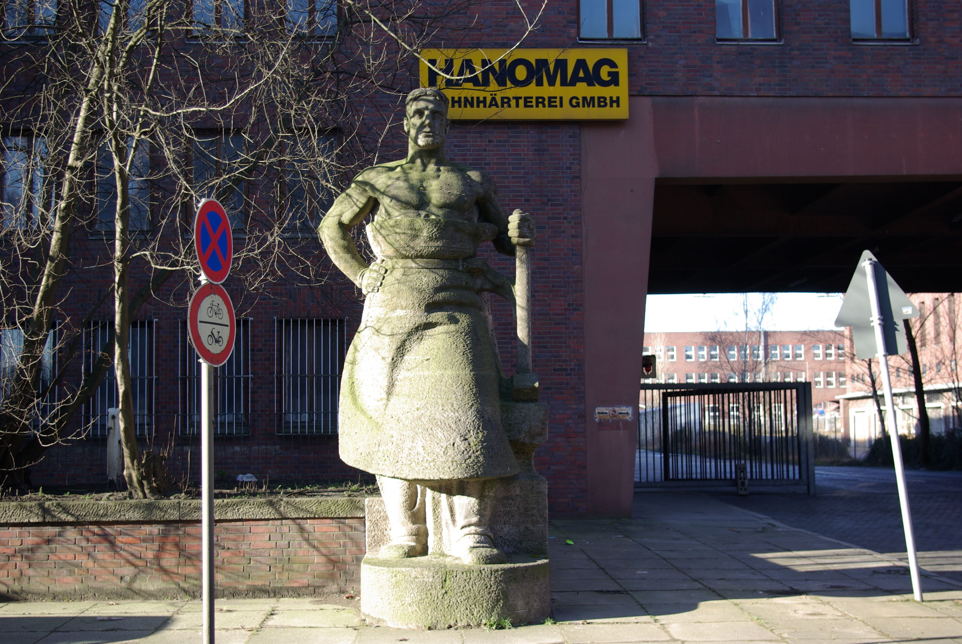 Hannover Ortsteil Linden. Die Statue steht an der Göttinger Straße direkt vor dem Eingang der Hanomag, der heutigen Lohnhärterei Hanomag.